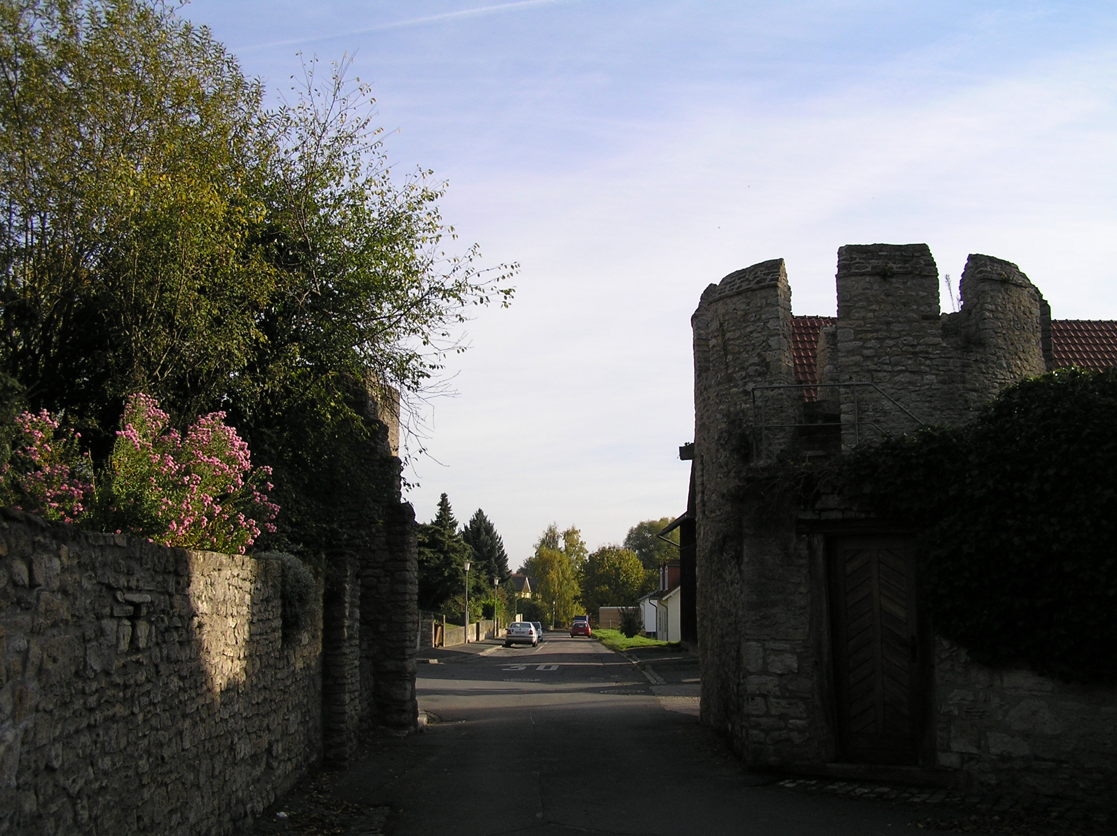 Stiegelgässer Tor (auch Stiegelpforte) vom Norden gesehen.